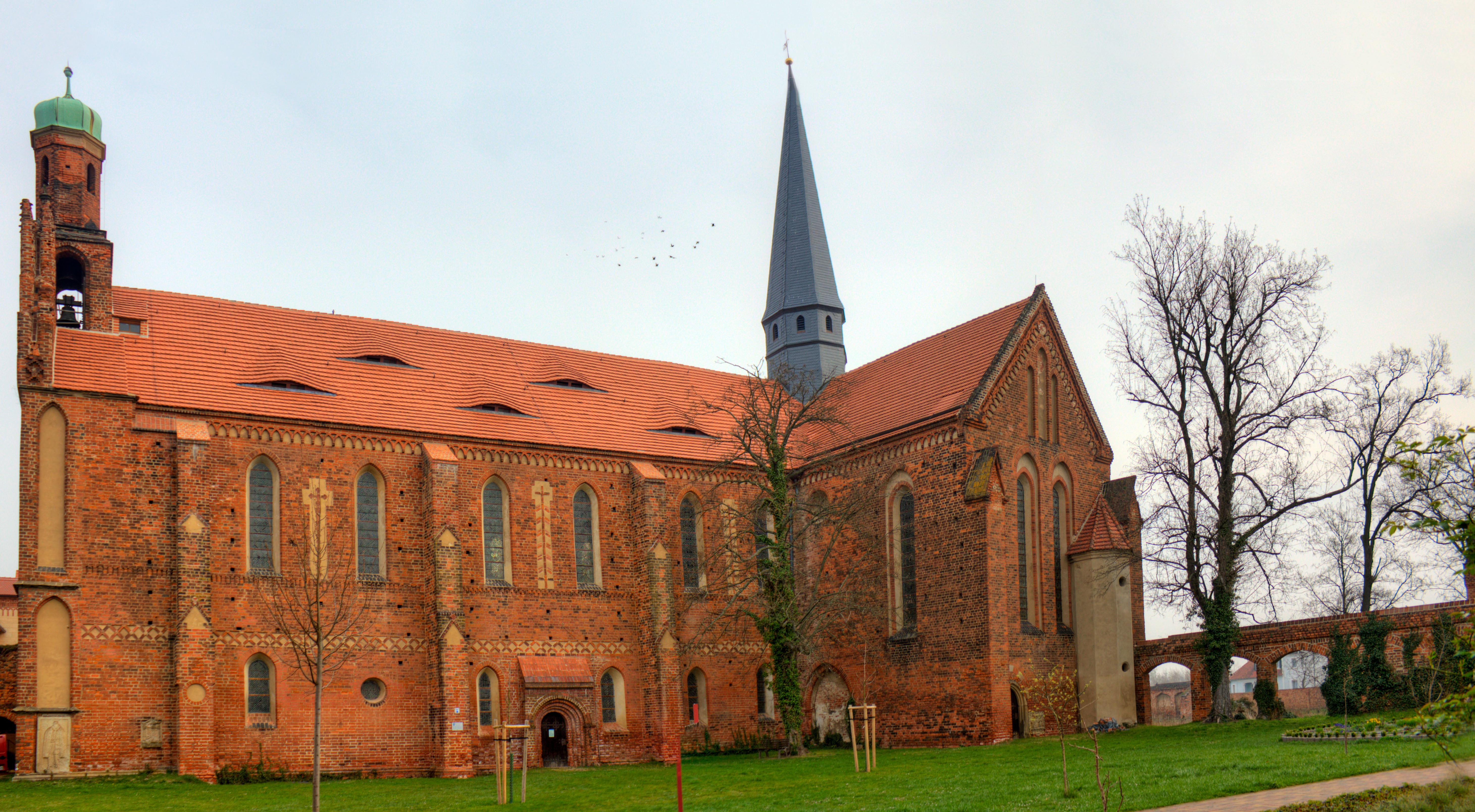 Klosterkirche St. Maria Mühlberg/Elbe